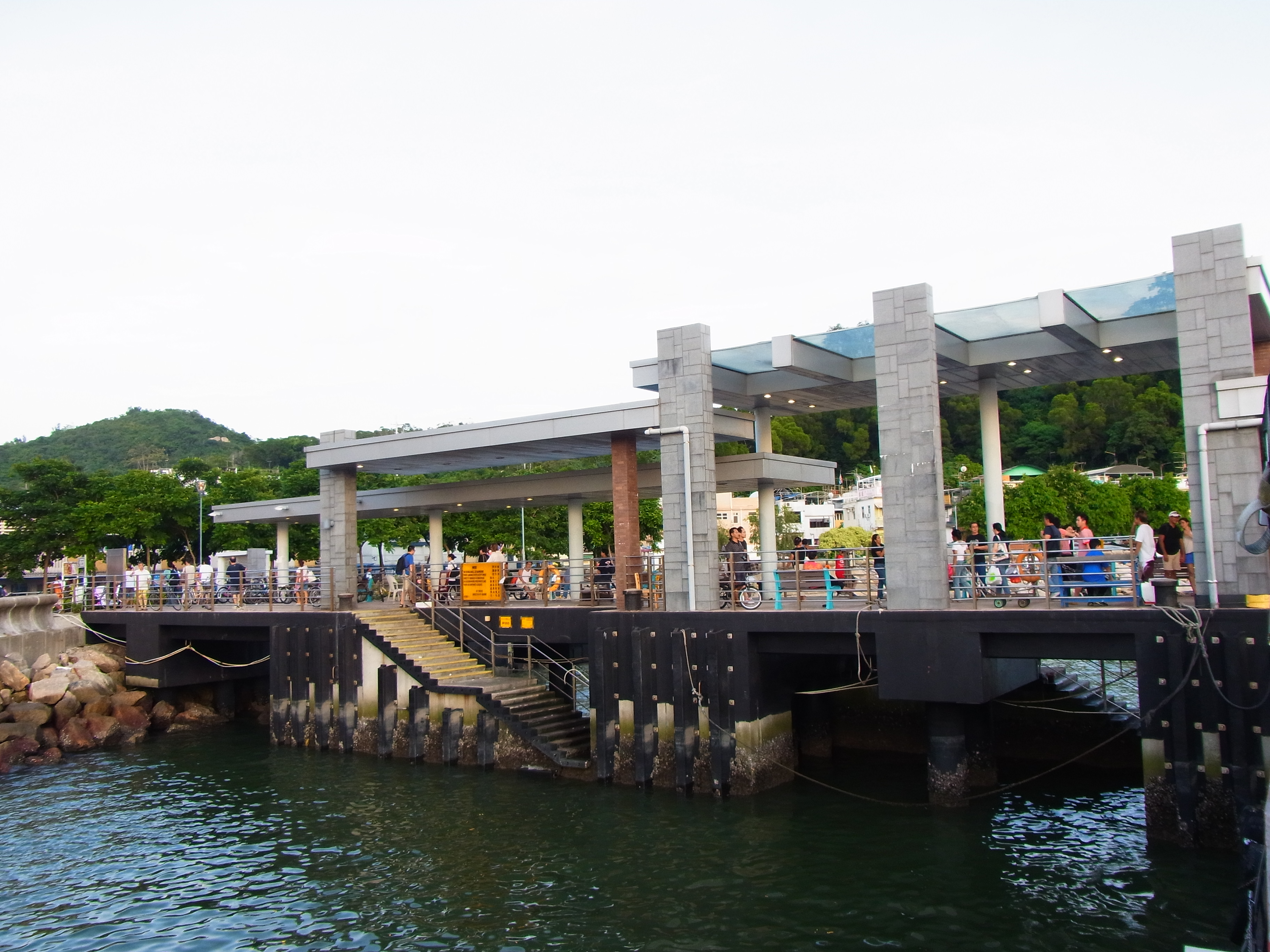 中文（香港）: 坪洲公眾碼頭